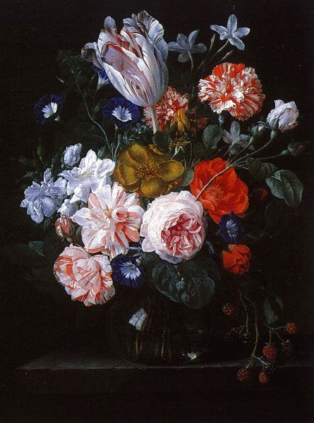 Een tulp, anjer en andere bloemen in een vaas